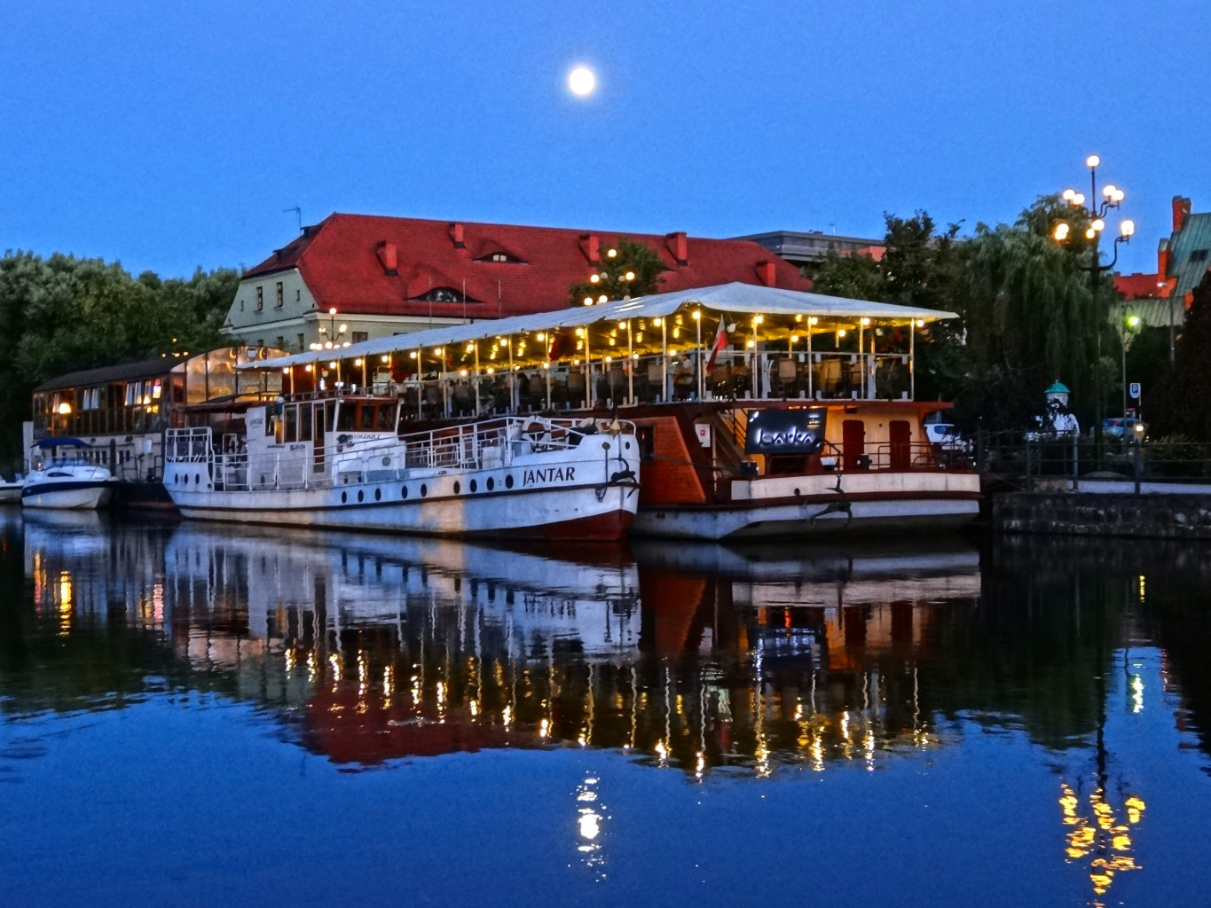 Południowe nabrzeże Brdy w centrum Bydgoszczy w sąsiedztwie pl. Solnego